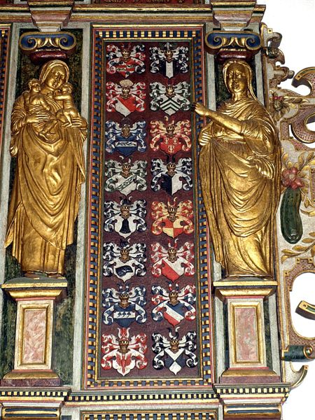 Hammel Kirke i Danmark. Epitafium over Valdemar Parsberg og Ide Lykke